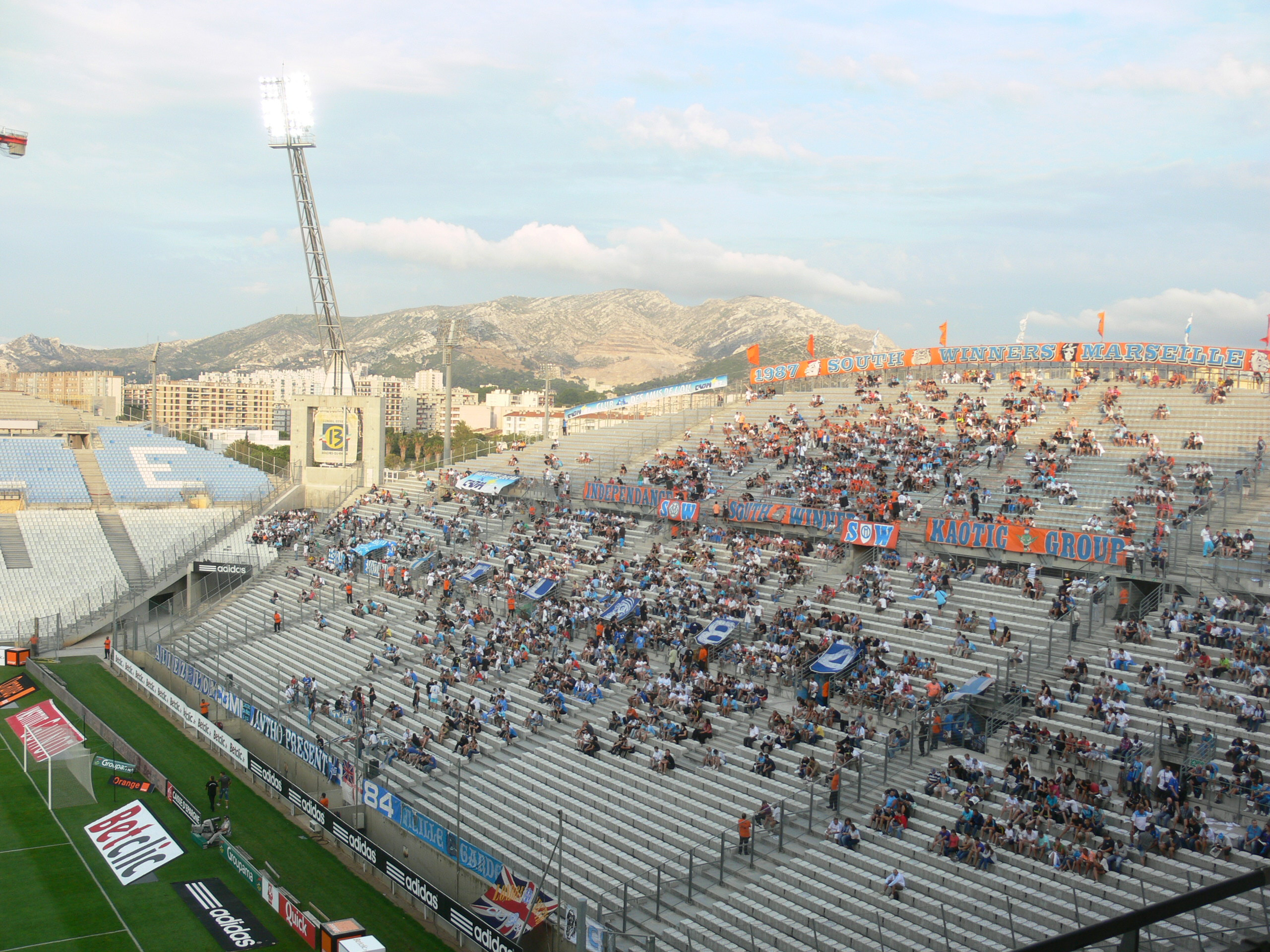 Virage sud du stade vélodrome de Marseille avant le match OM-Sochaux le 6 août 2011